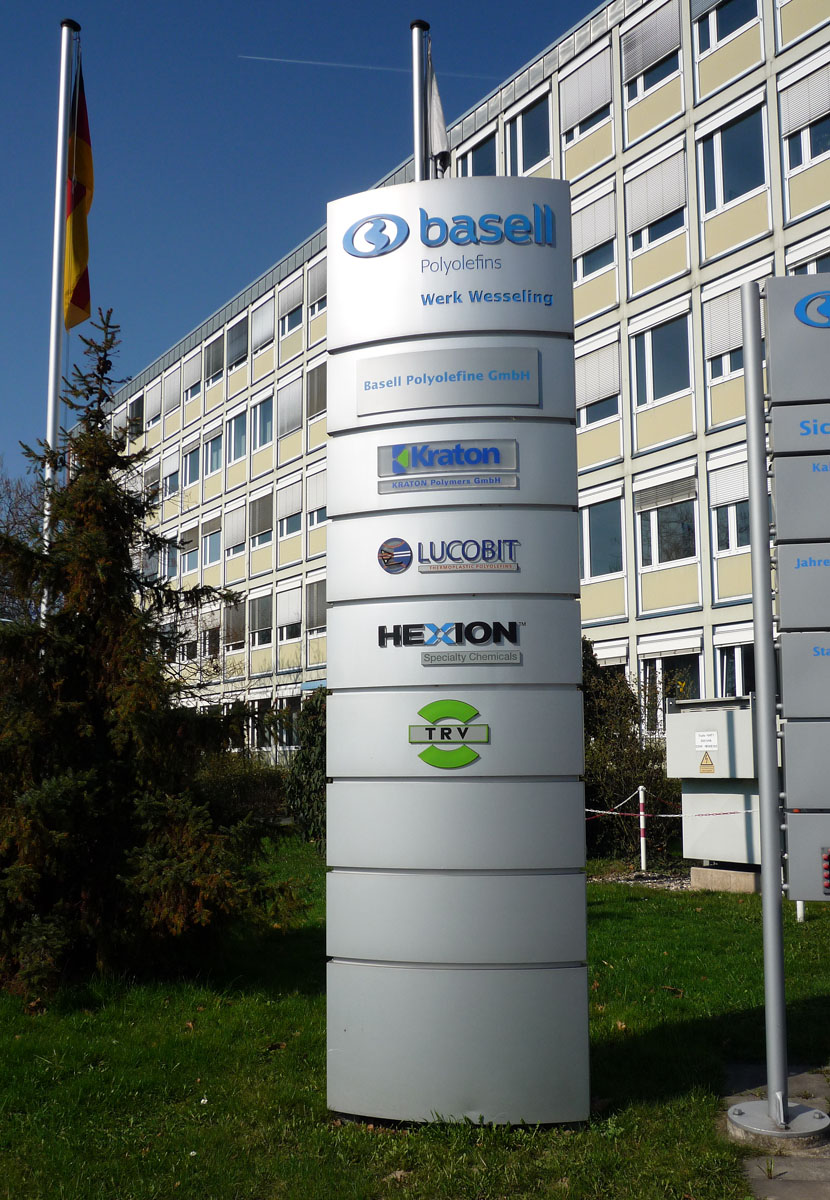 Basell Polyolefine GmbH, Werk Wesseling (Tor 1)